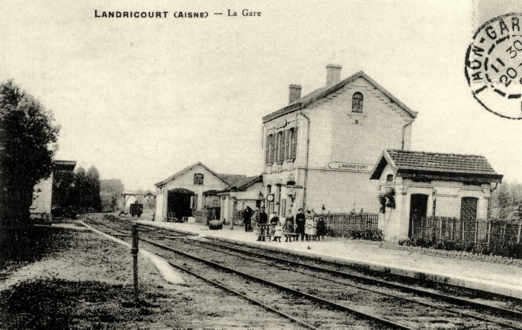 La gare vers 1920.